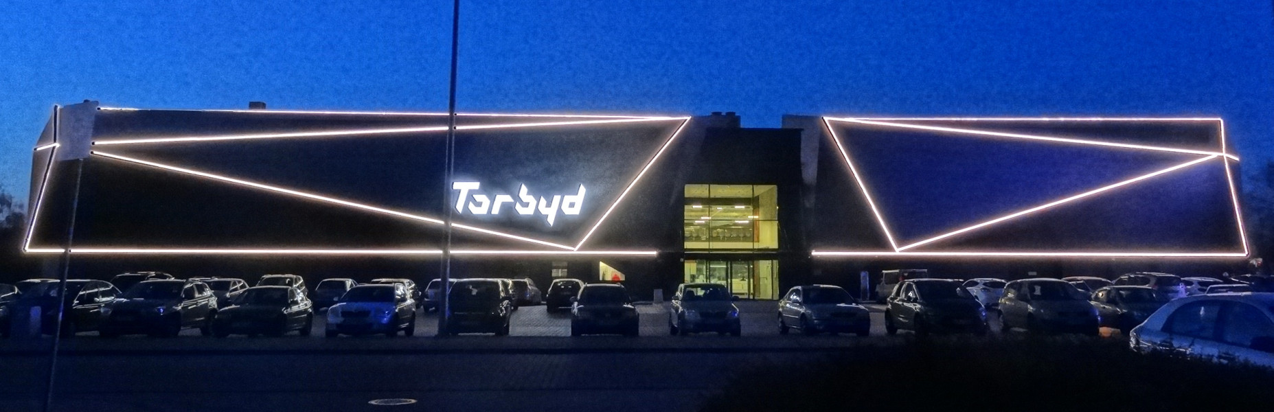 Sztuczne lodowisko "Torbyd" w Bydgoszczy, ul. Toruńska 59